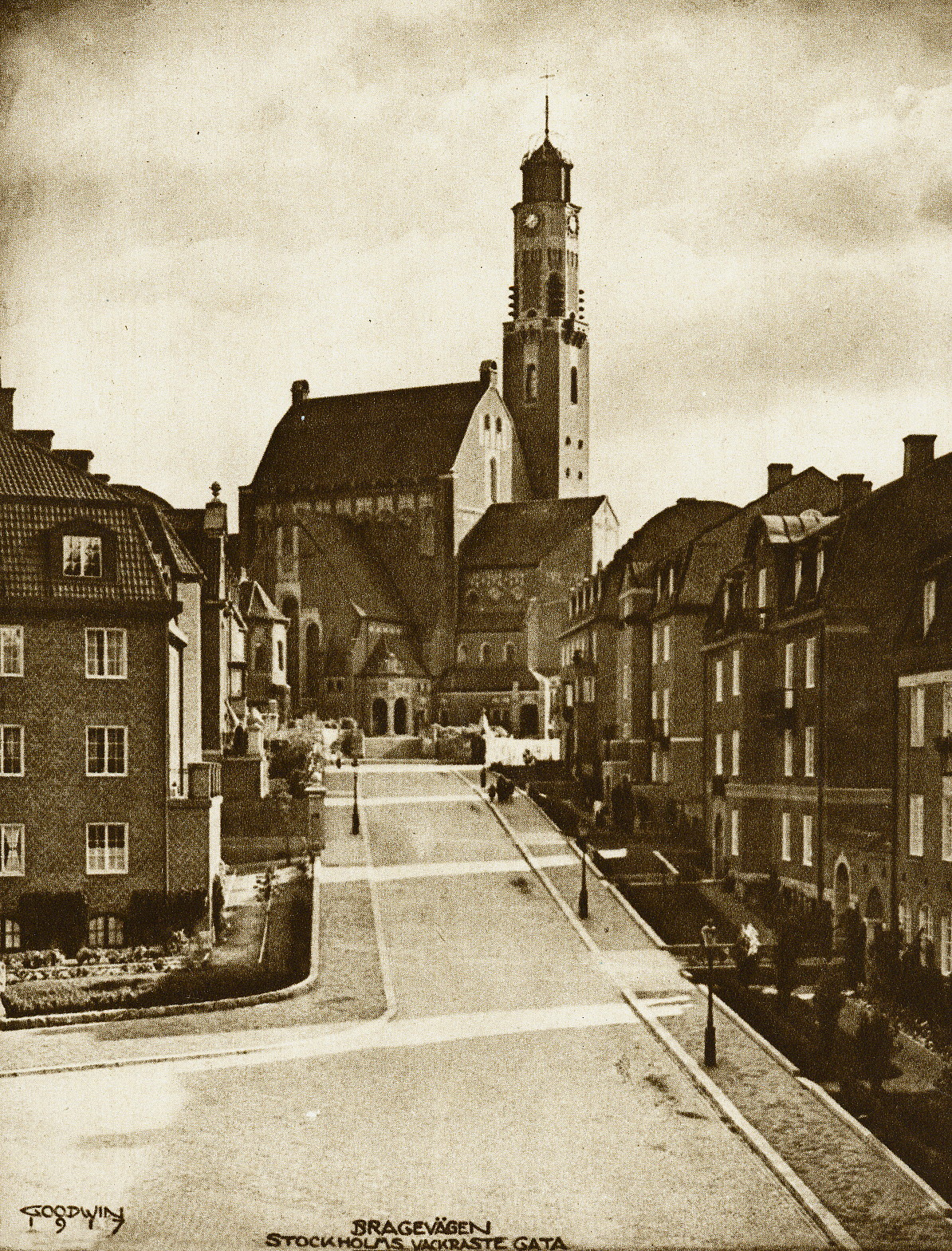 Goodwin, Henry Buergel 1917 Bragevägen, Stockholm Fotogravyr NMFF.003224-2